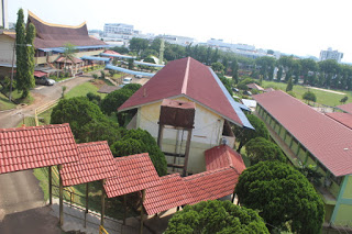 pemandangan dari atas